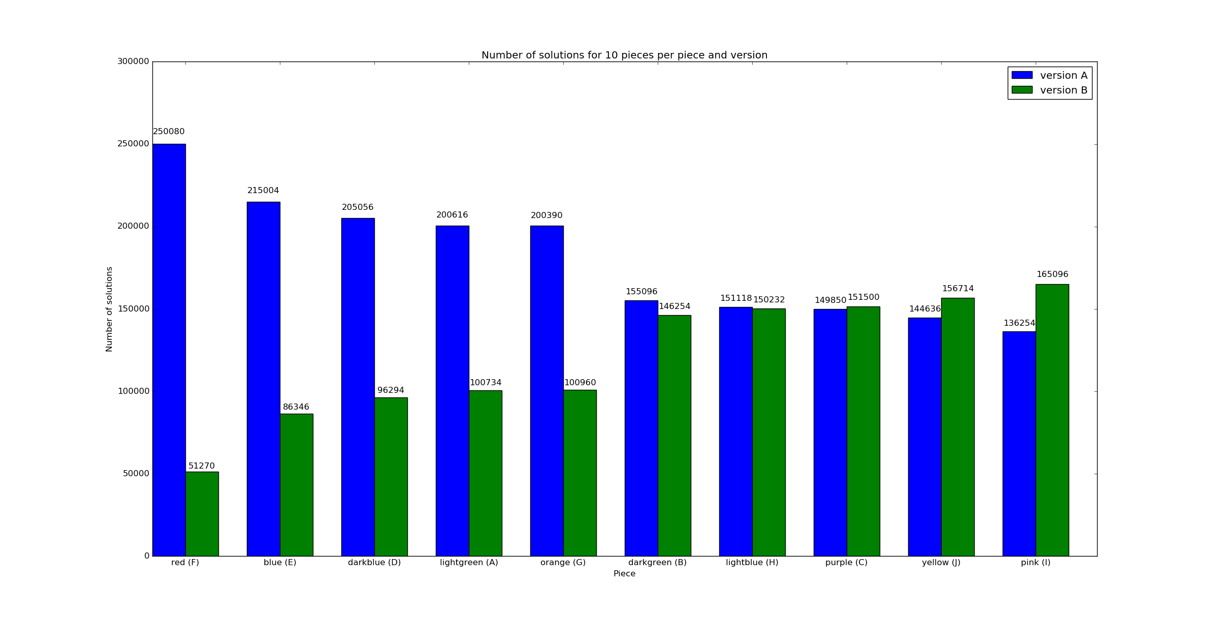 A graph showing the number of solutions per piece and per version for the puzzle game IQFit.